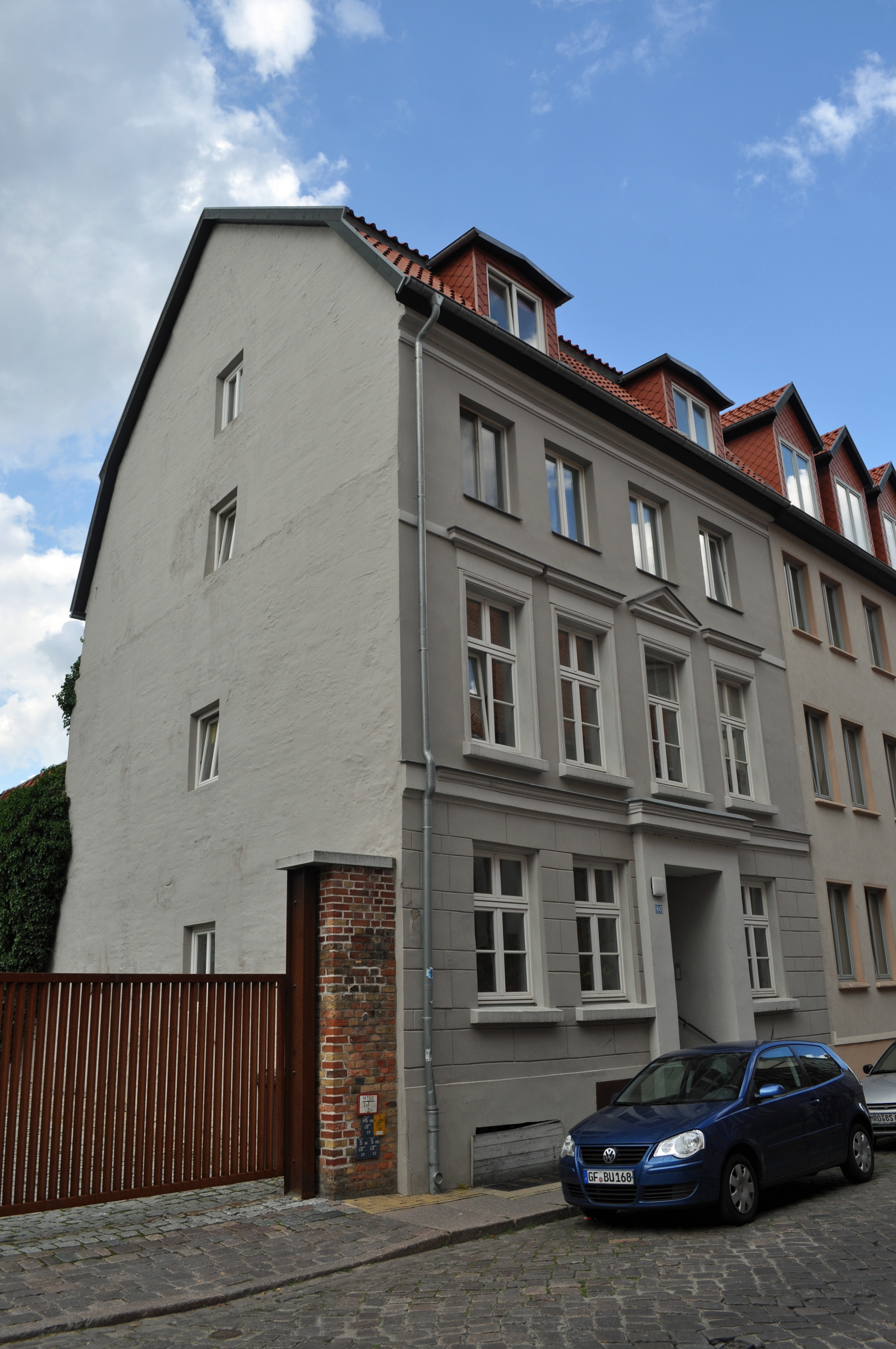 Das Foto zeigt ein Haus (bzw. Details des Hauses) in der Frankenstraße in Stralsund, Deutschland. Die Hausnummer steht im Dateinamen. Aufgenommen am 19. Juli 2011 vom Benutzer:Klugschnacker.